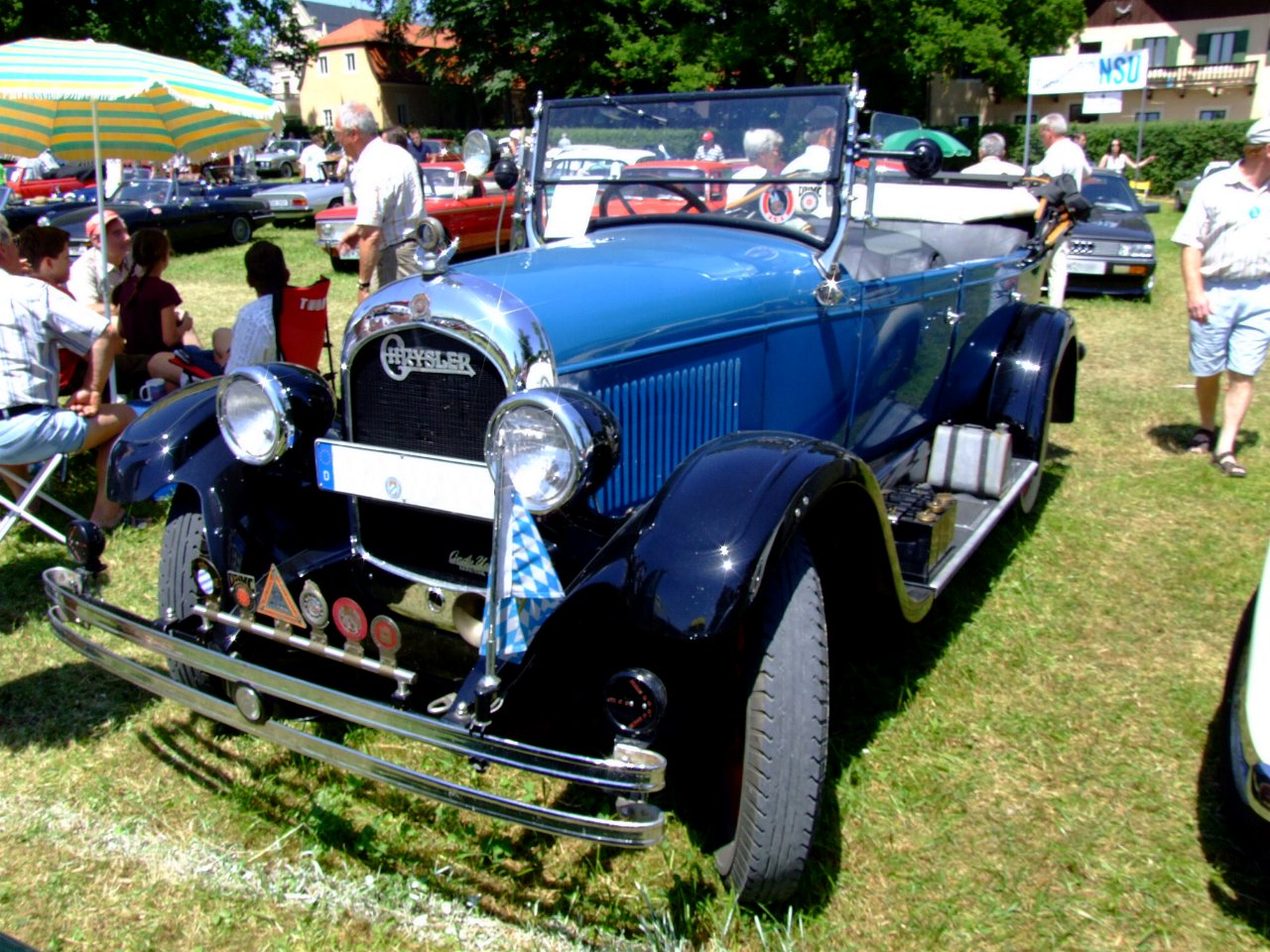 Chrysler 52 Baujahr: 1927 45 PS Quelle: selbst fotografiert, 06/2006 Fotograf: Späth Chr. Licensing